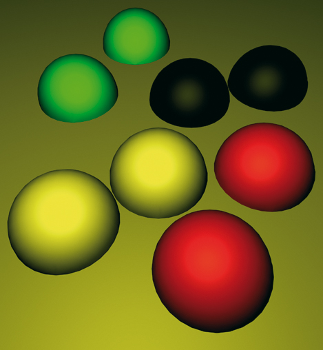 Adibide hauekin ikusten dugu nola argiaren koloreak objektuen koloreen perzepzioa aldatzen du. Horregaitik ondorioztatzen dugu: 1.- Azal zuriek argiaren kolorea hartzen dute zuri koloreak argiaren kolorea aldatzen ez duelako. Argi zuriak ere ez du objektu azaleen kolorea aldatzen. 2.- Argia koloreztatuak kolore bereko azal baten gainean ez du objektuaren kolorea aldatzen. 3.- Azal batean beltza ikusiko dugu baldin eta jotzen duen argiak badu hain zuzen ere azal horrek errebotatzen ez duen argi espektroren zatia (kolorea). Argi horiaren irudian, kasu, beltza bada bola urdina horrek espektro osoa hartzen du urdina izan ezik. 4.- Azal batean ikusten dugun kolorea nahasketa kengarria da non argiaren argi espektroari azalak hartzen duen espektro horren zatia kentzen diogun.